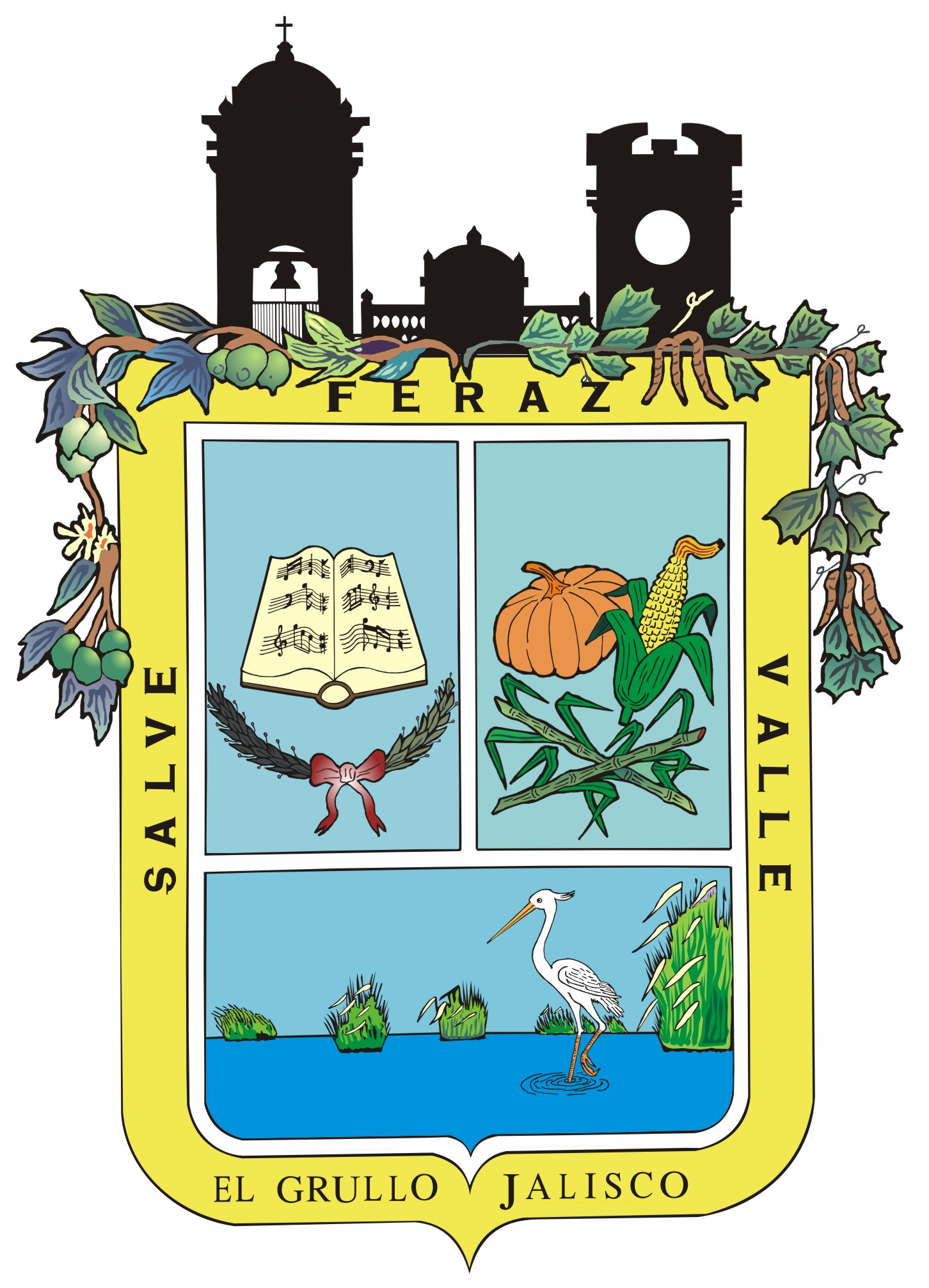 Heraldica Oficial de El Grullo